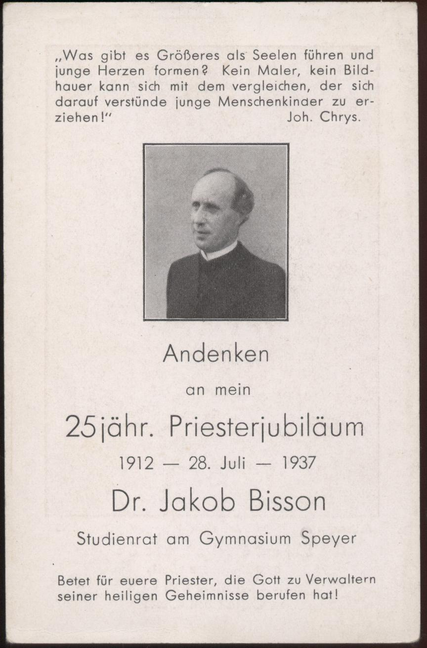 Dr. Jakob Bisson, Priester, Historiker, Speyer, Jubiläumsbildchen